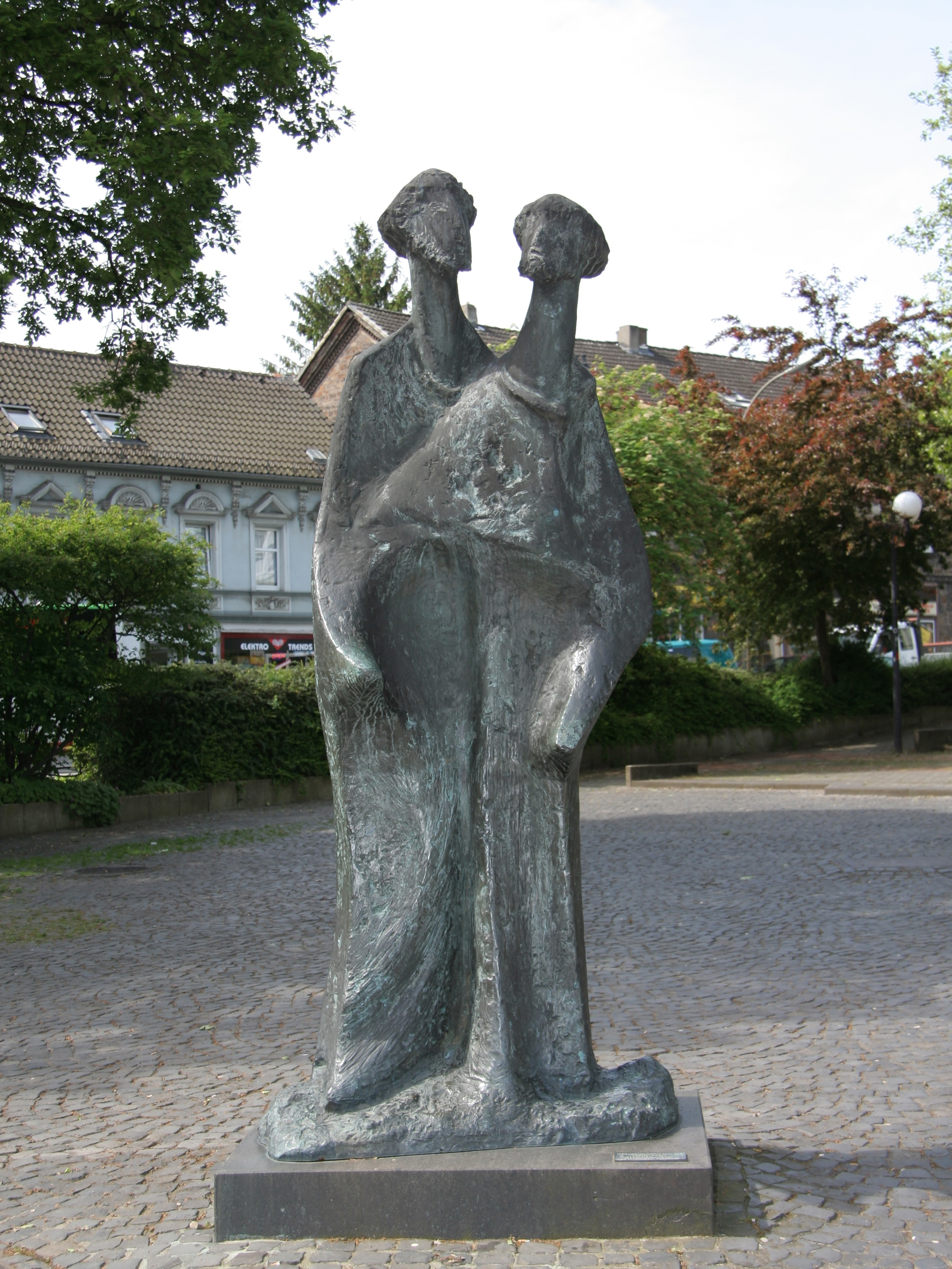 Denkmal der heiligen Ewalde auf dem Aplerbecker Marktplatz, Künstler: Kuno Lange